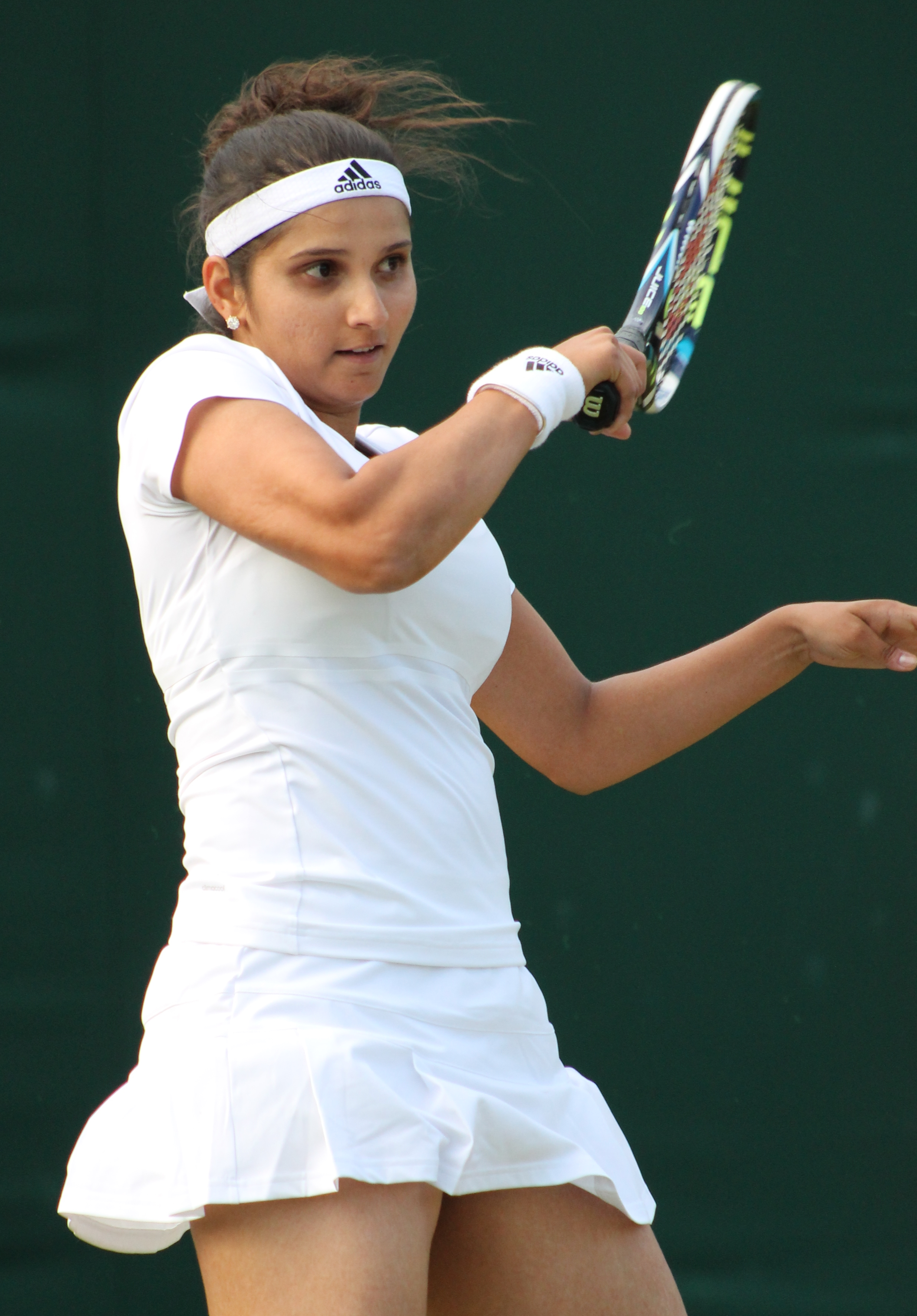 Mirza WM14 (15)